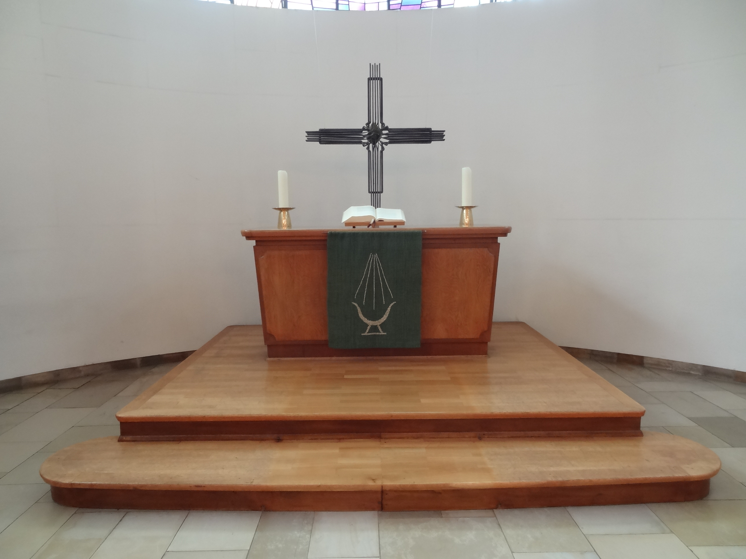 Lukaskirche (Gießen)